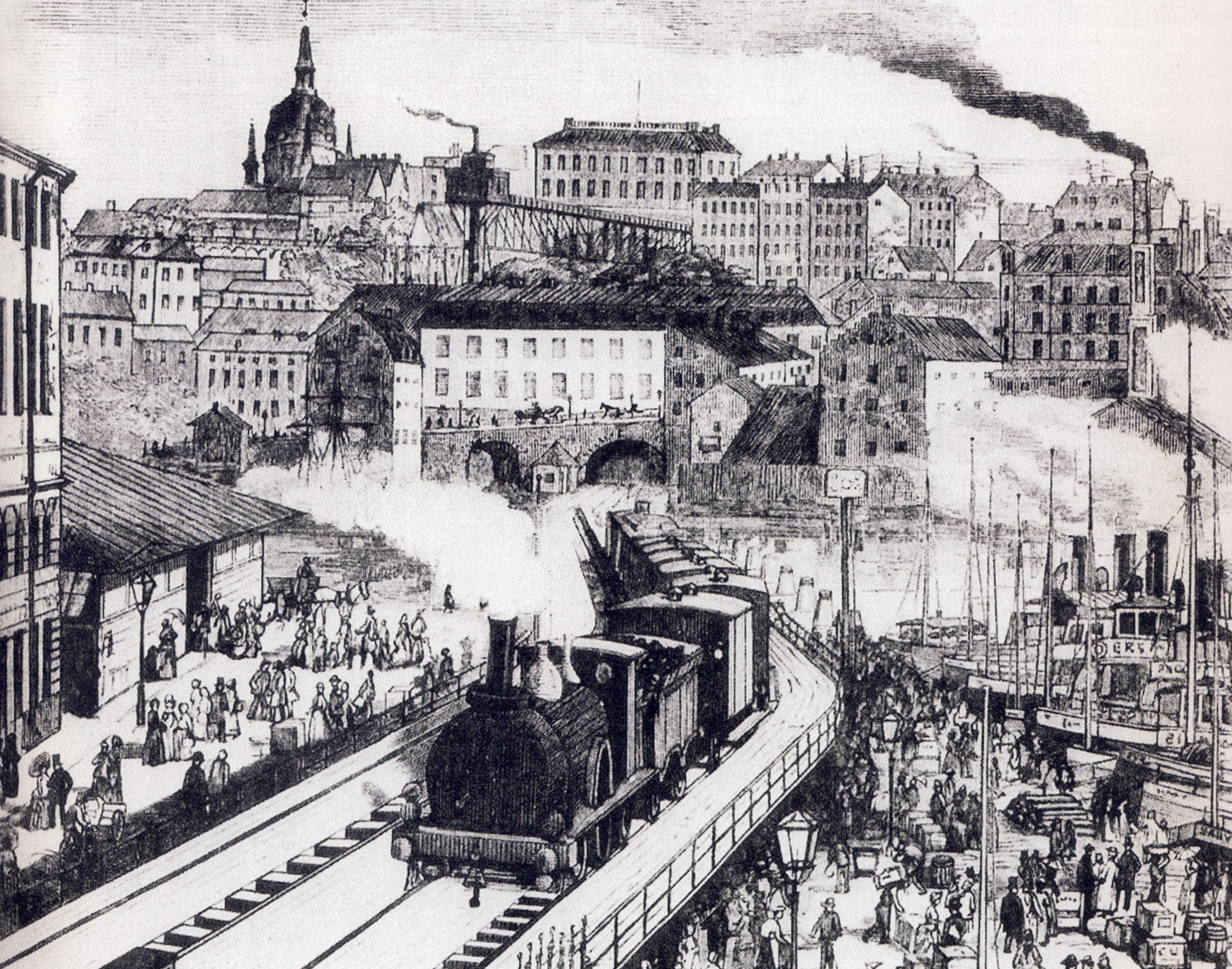 Tåget på "Sammanbindningsbanan" kommer ur tunneln från Södermalmssidan.